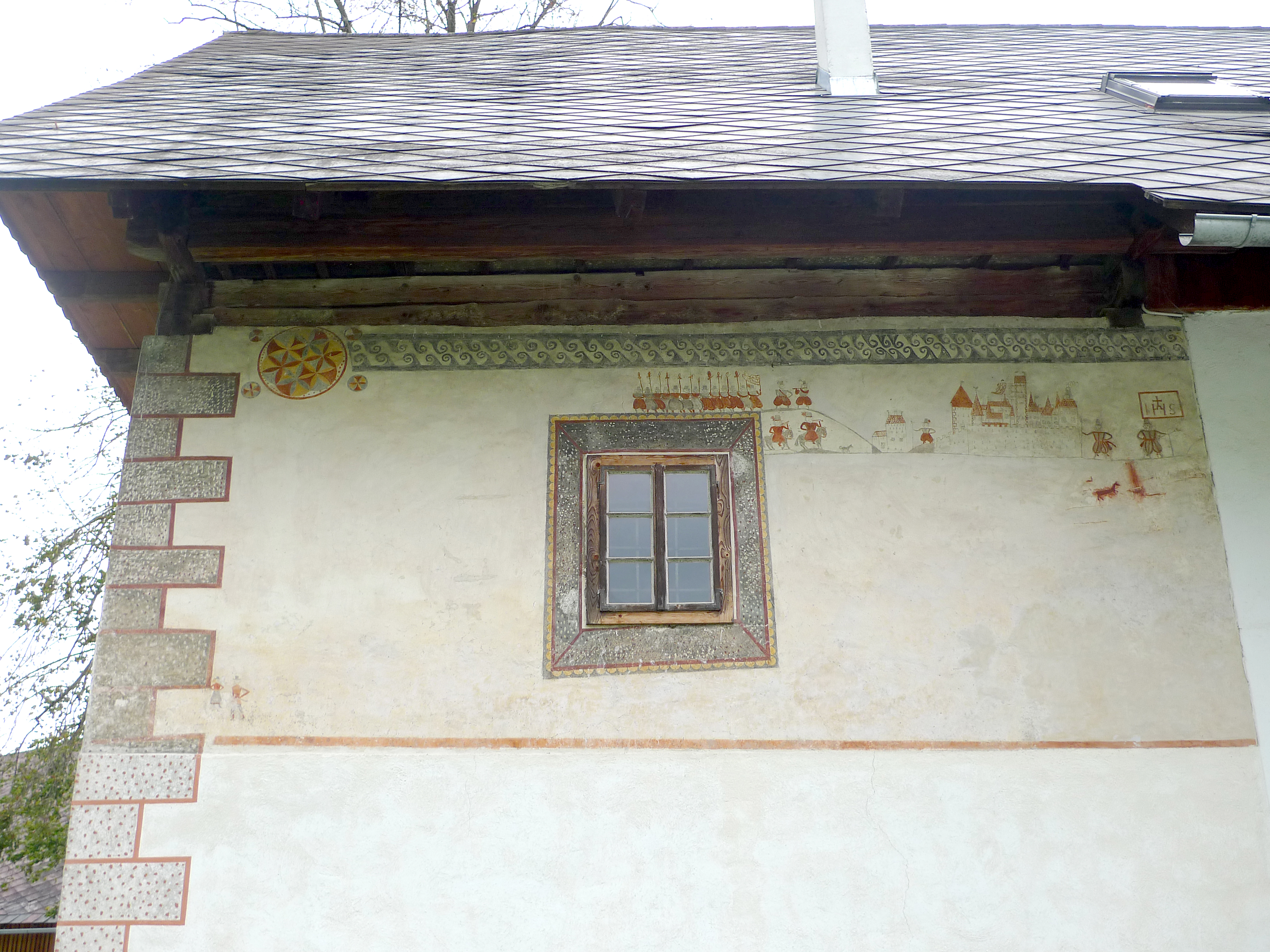 Bauernhaus, vulgo Lenhard, Ritterhaus